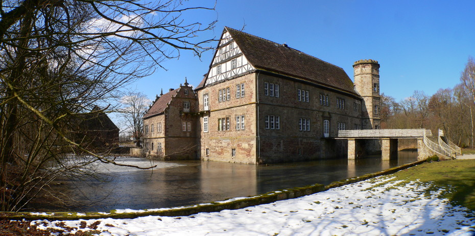 Wasserschloss Schweckhausen (Parkseite) in Willebadessen, Nordrhein-Westfalen, Regierungsbezirk Detmold, Landkreis Höxter